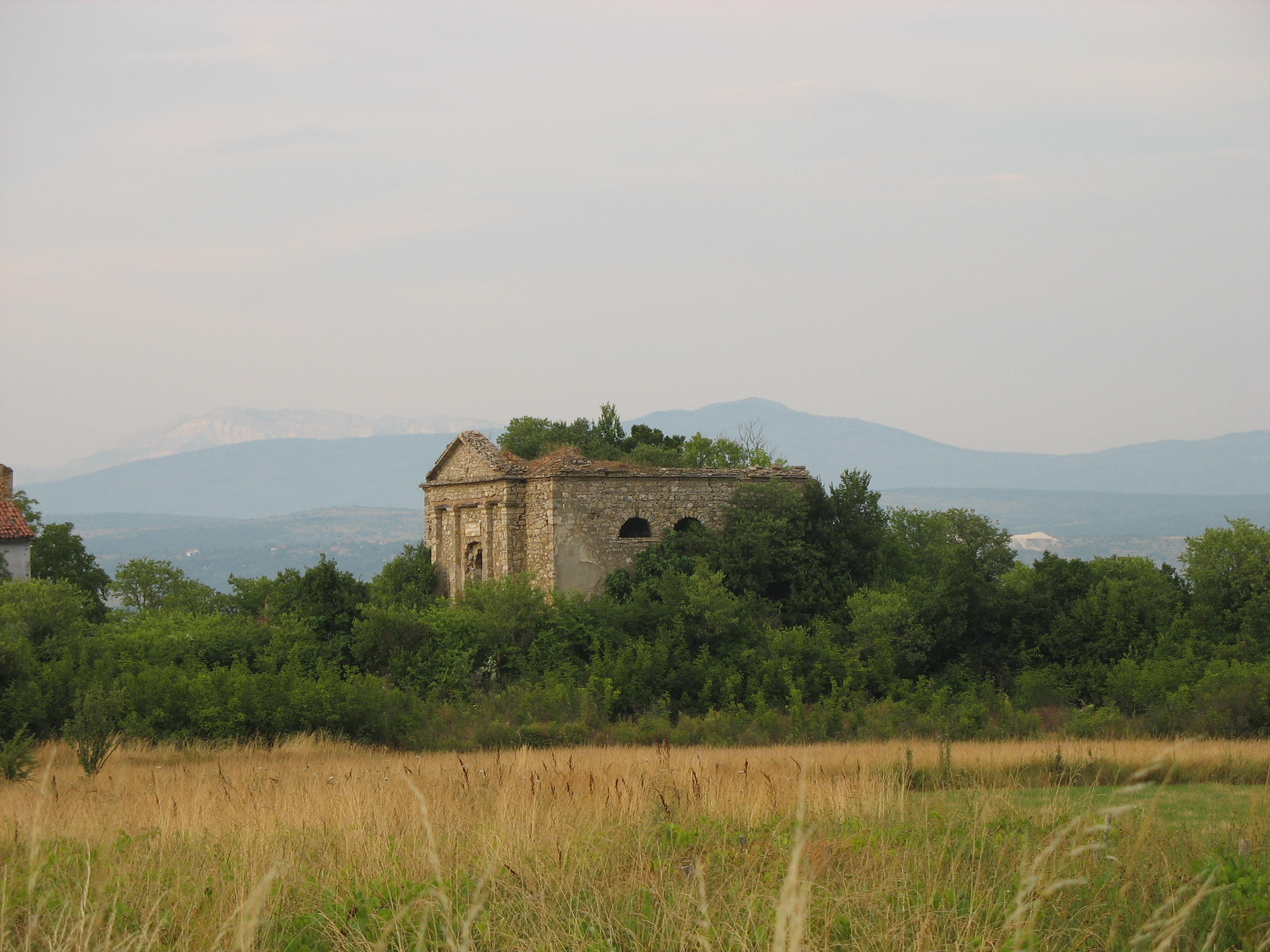 Srušena grkokatolička crkva Pokrova Presvete Bogorodice u Kričkama kod Drniša.